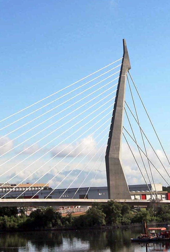 Foto da Ponte do Saber em sua inauguração. Esta imagem é uma obra derivada de